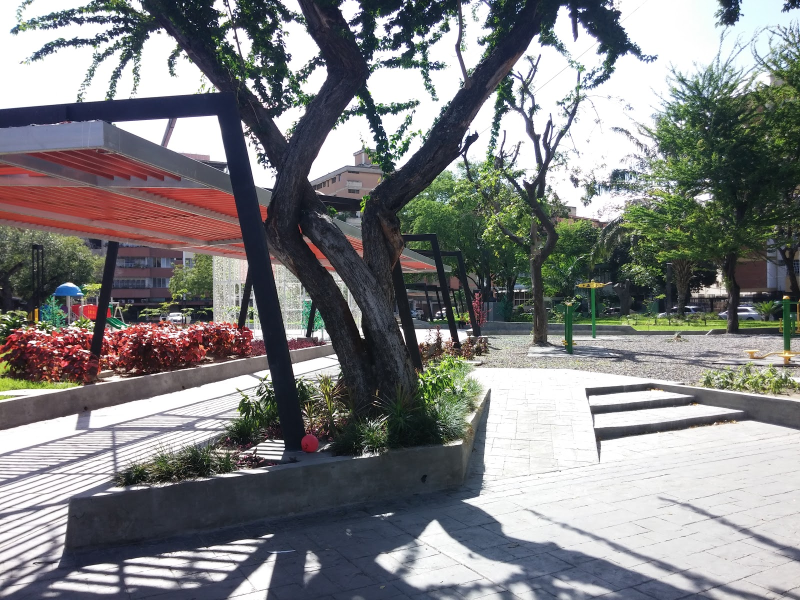 Urbanización la Soledad